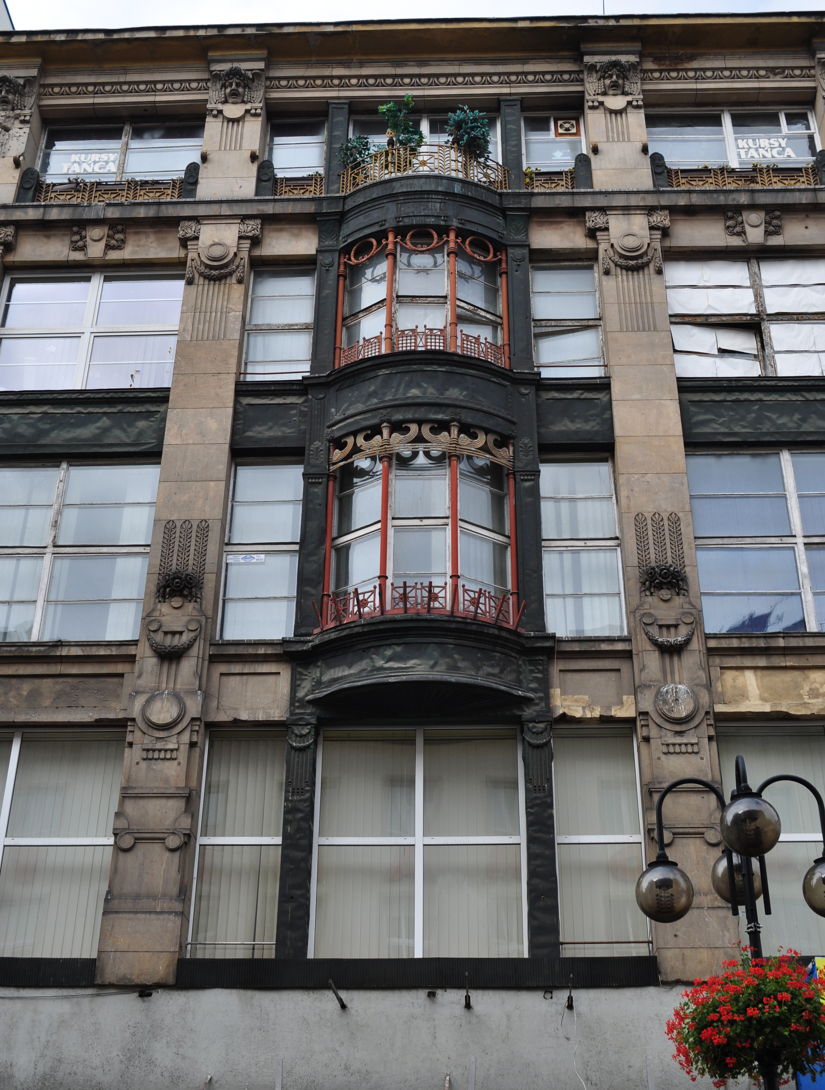 Wrocław Stare Miasto, ul. Świdnicka 19 - dom handlowy Modehaus, z wewnętrznym dziedzińcem, obecnie budynek handlowo biurowy, 1905-1910